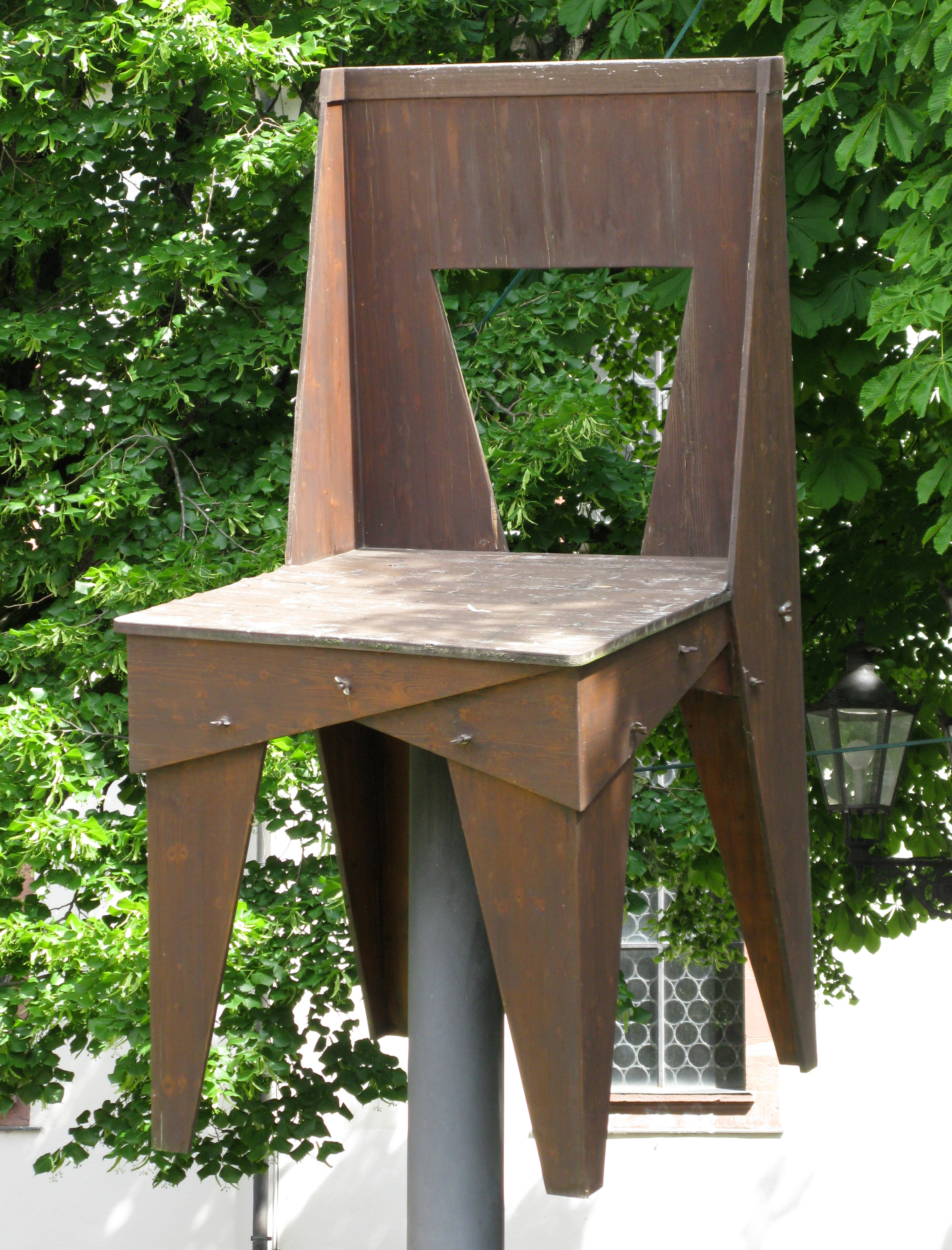 Maxistuhl Wingnut Chair von Jasper Morrison, in Weil am Rhein-Altweil, Lindenplatz, Maßstab 3:1, 1984